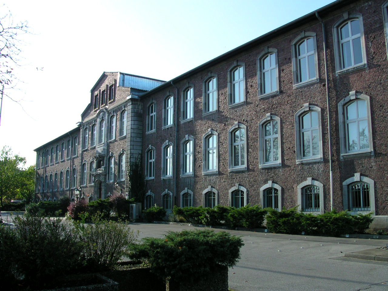 Talbot-Hauptgebäude an der Jülicher Straße, gegründet von Talbot und Pauwels, heute Bombardier